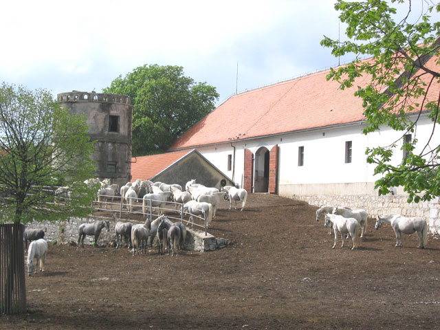 Lipizzanergestüt in Lipica, Gemeinde Sežana in Slowenien